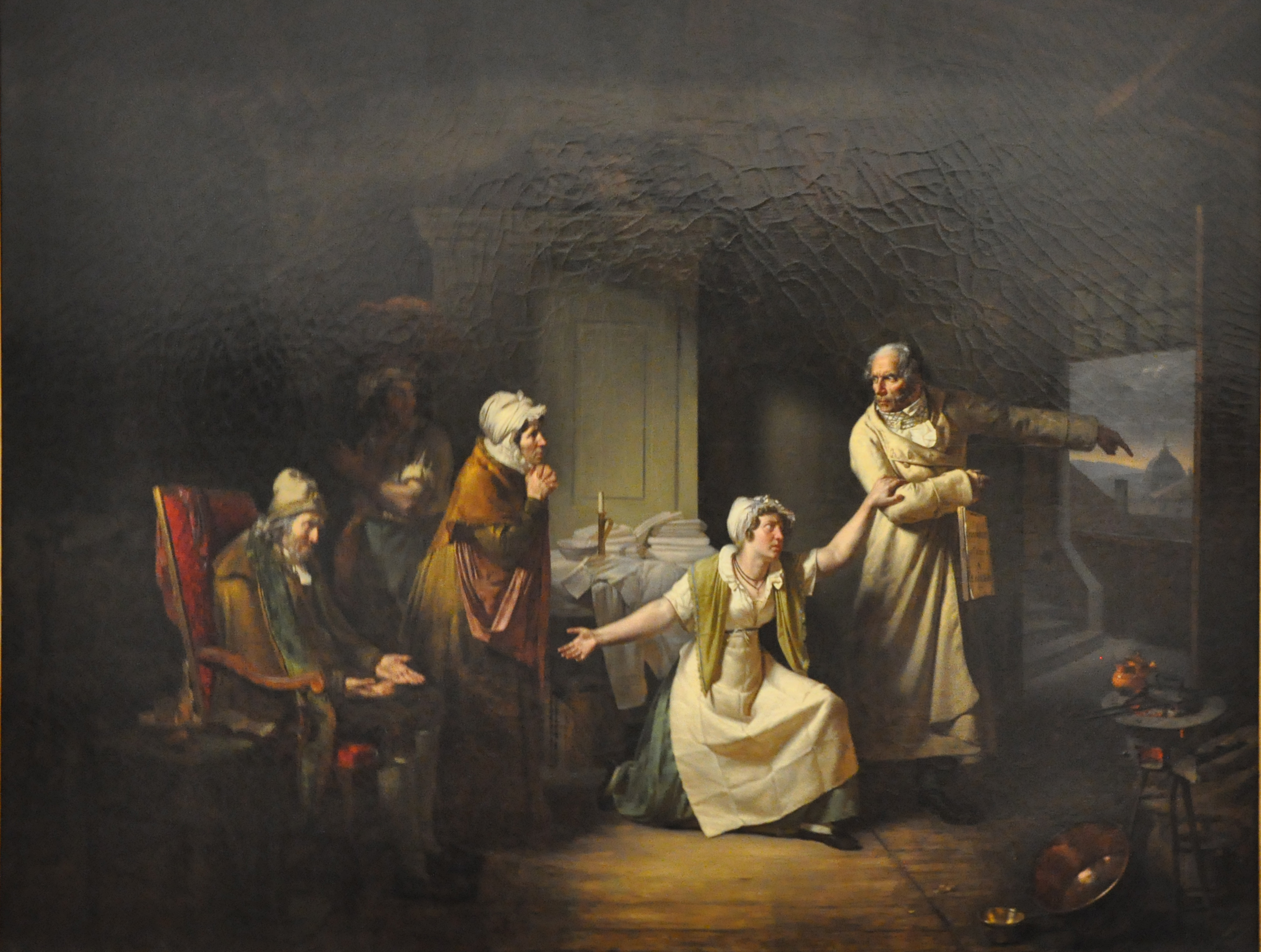 Dans la manière de Greuze, on voit le propriétaire montrer la porte au vieillard grabataire qu'il veut expulser.